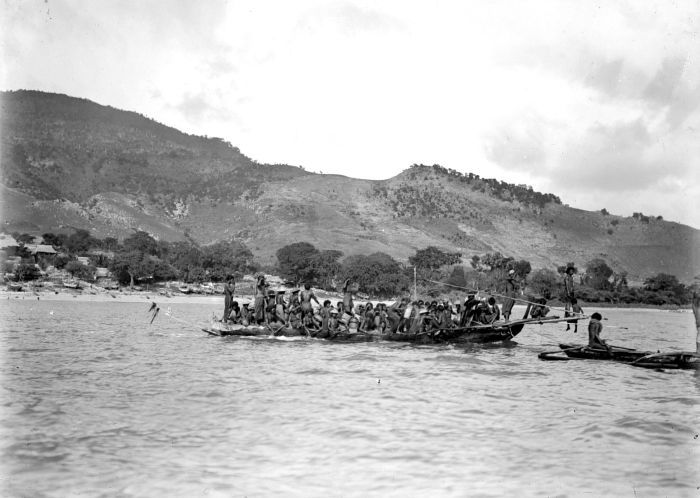 Negatief. Deze foto is gemaakt tijdens de Siboga Expeditie van 1899-1900.. Walvisvaarders bij Lamakera, Solor ten oosten van Flores